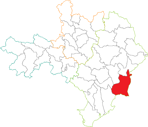 Situation du canton dans le département du Gard (France)